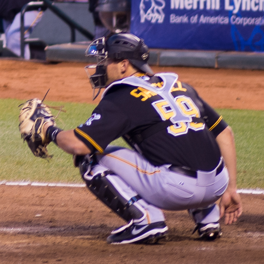 Tony Sanchez